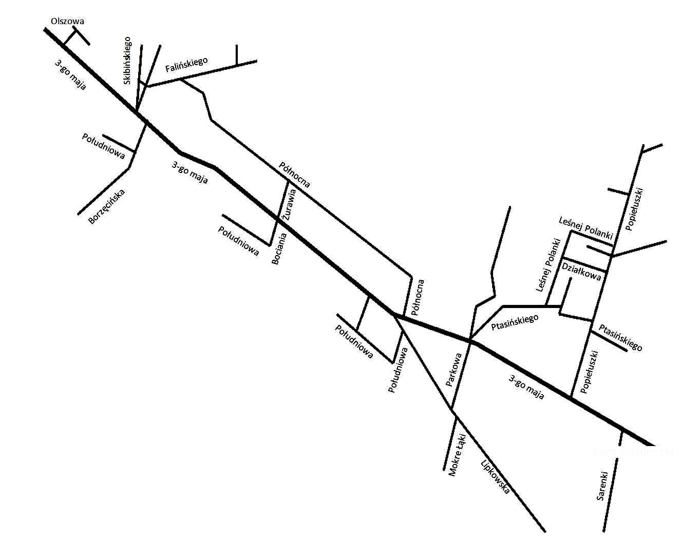 Truskaw